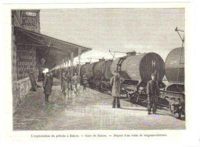 поезд с нефтью на станции Баку, конец 19 в.